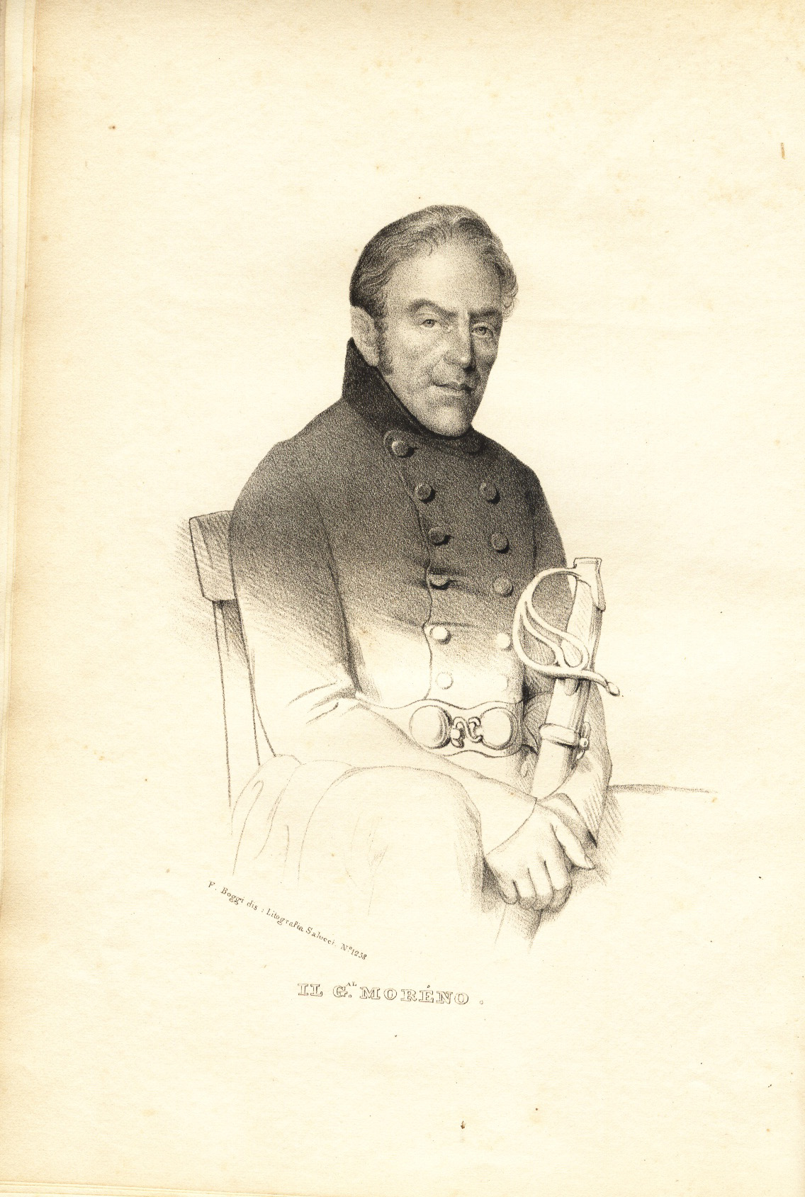 Vicente Gómez Moreno. Dibujo de Isidoro Magués. "Don Carlos e i suoi difensori". Firenze 1837